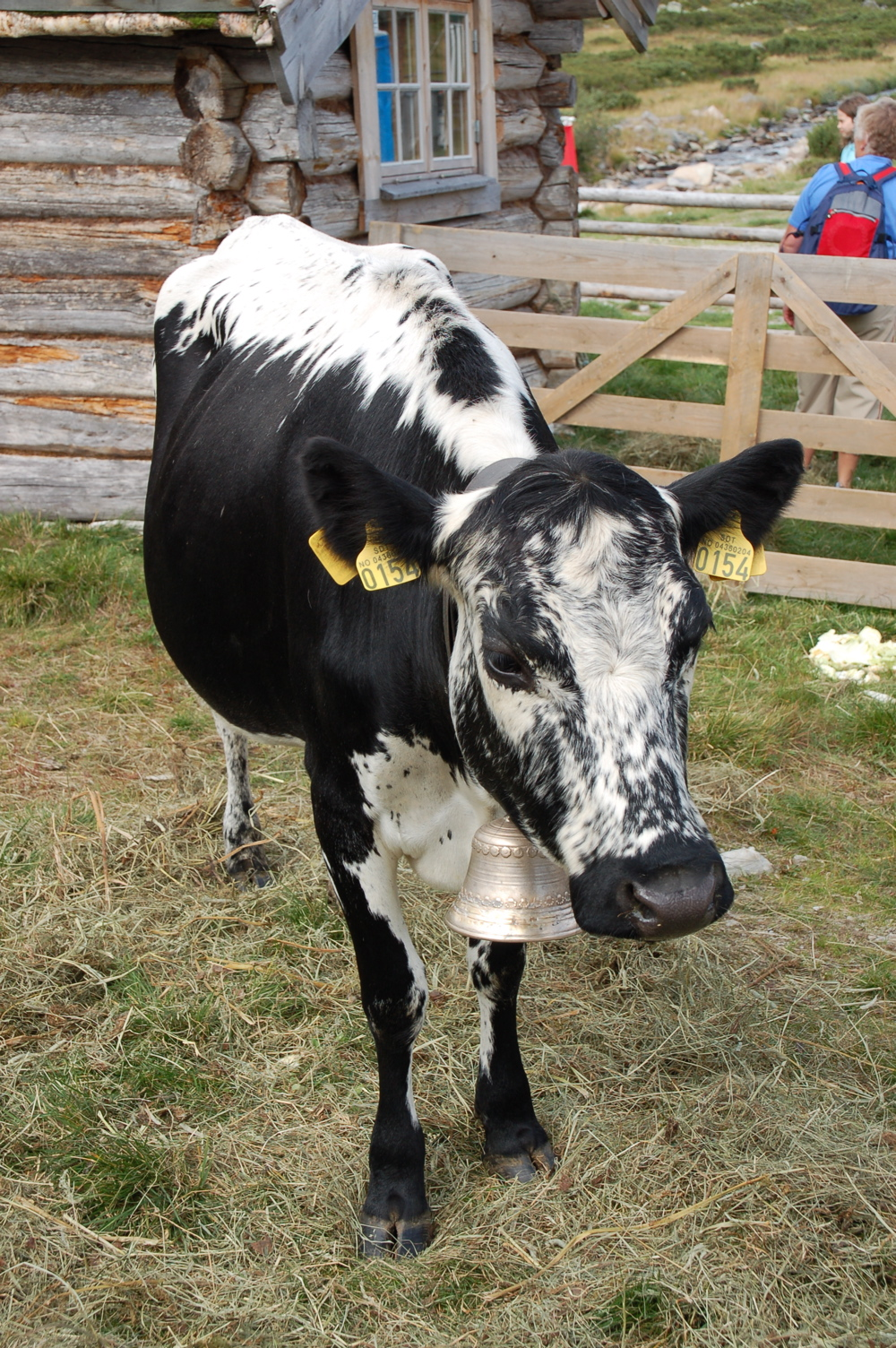 Cow (STN Sidet Trønder- og Nordlandsfe), Rausjødalen Setermeieri, Tolga, Hedmark, Norway, Summer 2006